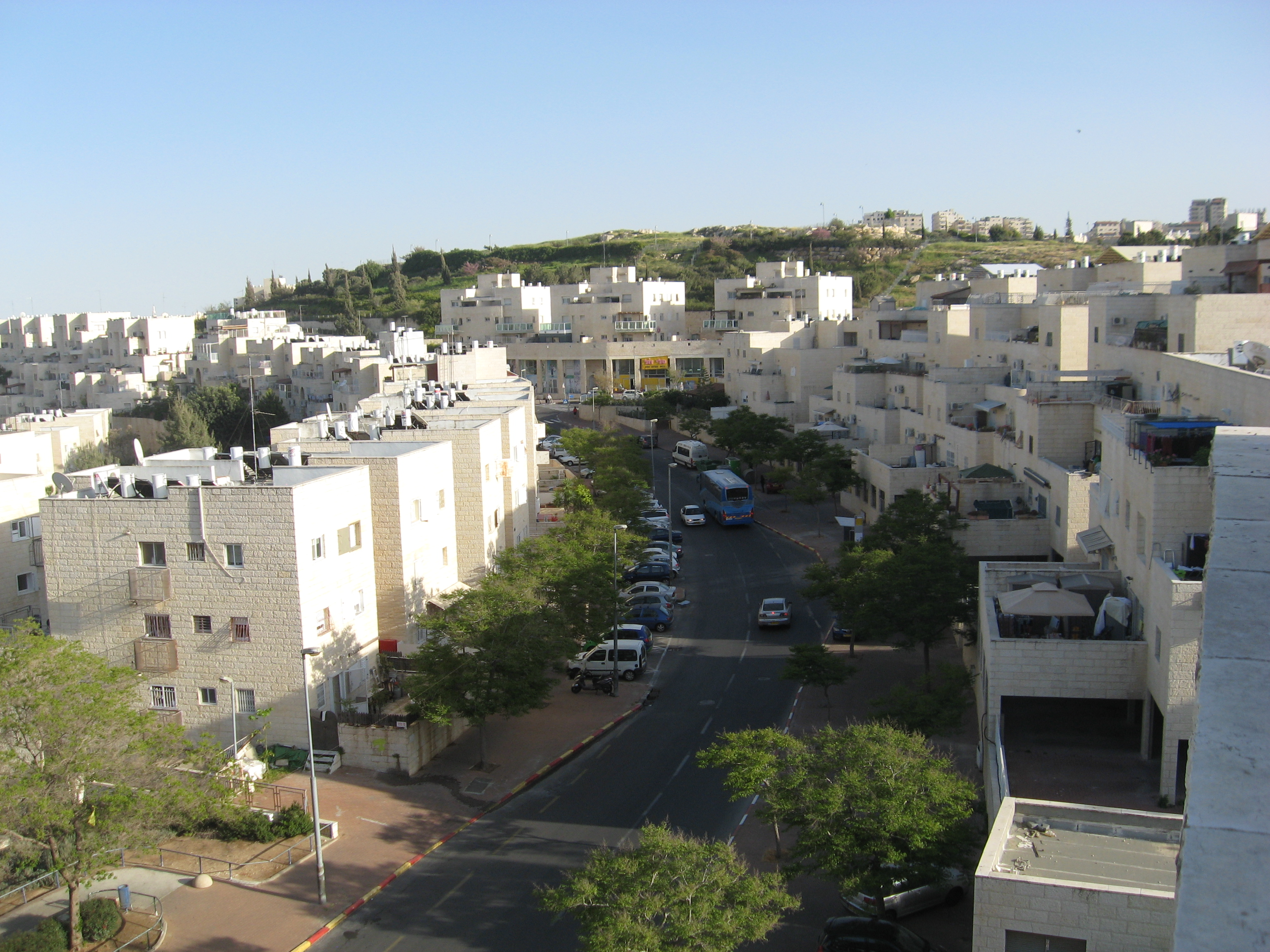 Иерусалимский район Писгат-Зеев. Вид с крыши дома № 16 на улице Йосеф Недава.